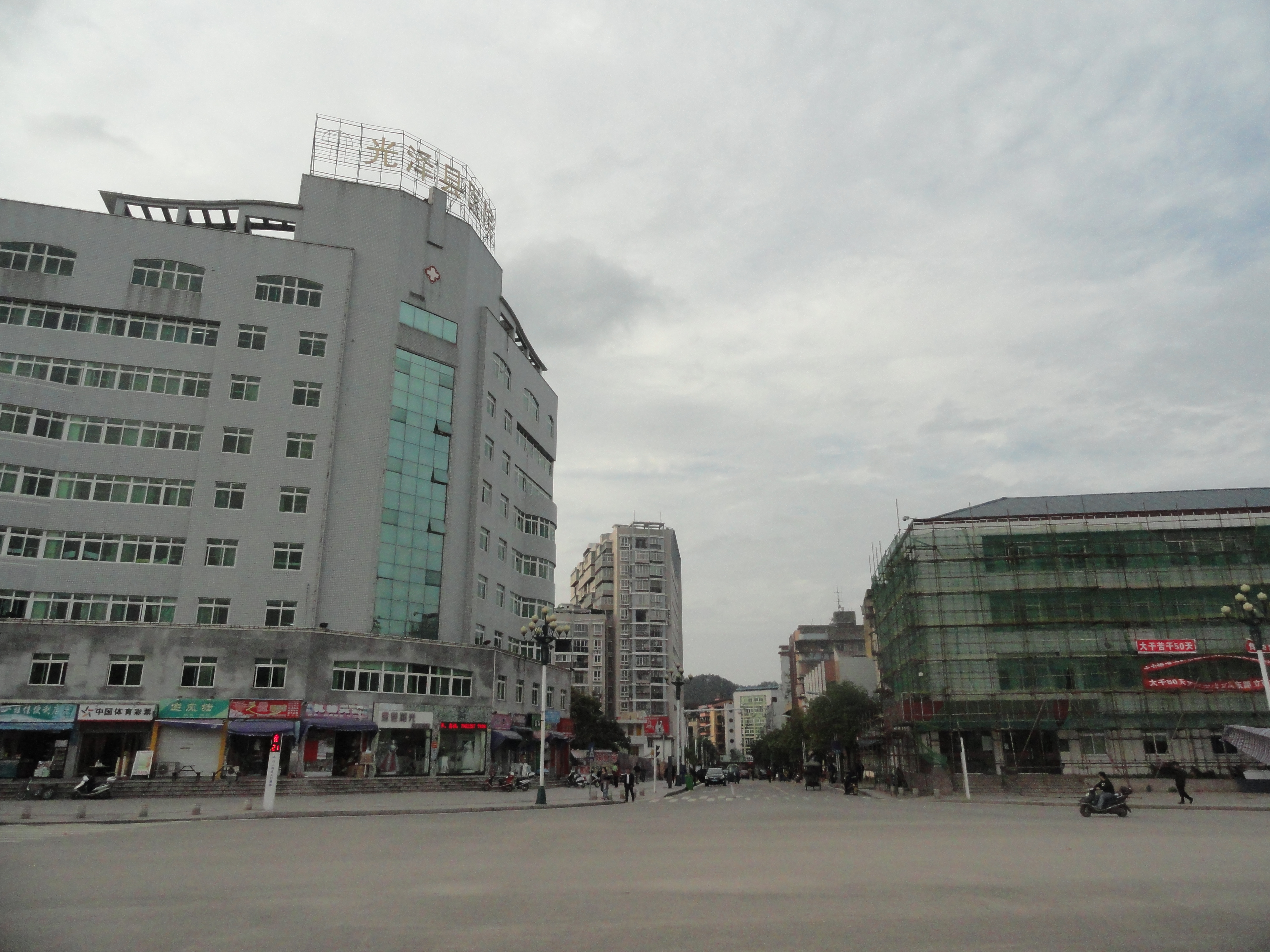 在文昌路沿中山街方向拍攝的光澤縣城關